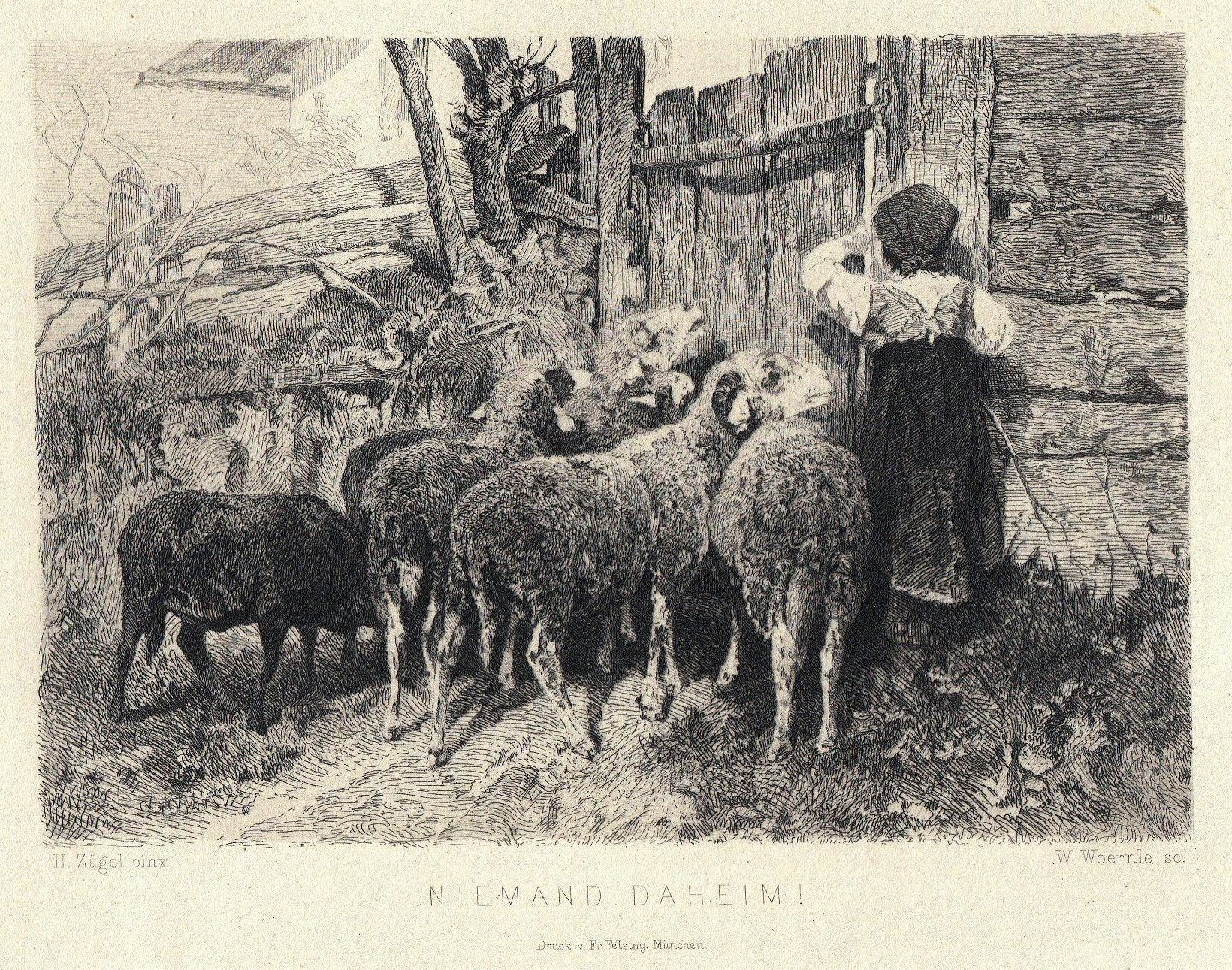 Radierung von Wilhelm Woernle, Plattengröße 9 x 13cm, Titel: "Niemand daheim!" Reproduktion nach einem Gemälde vob Heinrich Zügel, 1878, Veröffentlicht in der Zeitschrift für bildende Kunst, Leipzig 1878